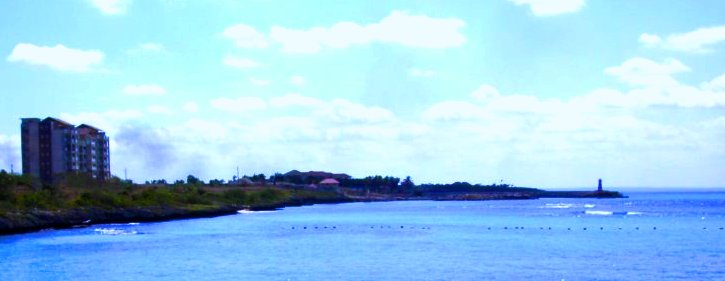 La Playa Caleta(La mas fea en la ciudad)